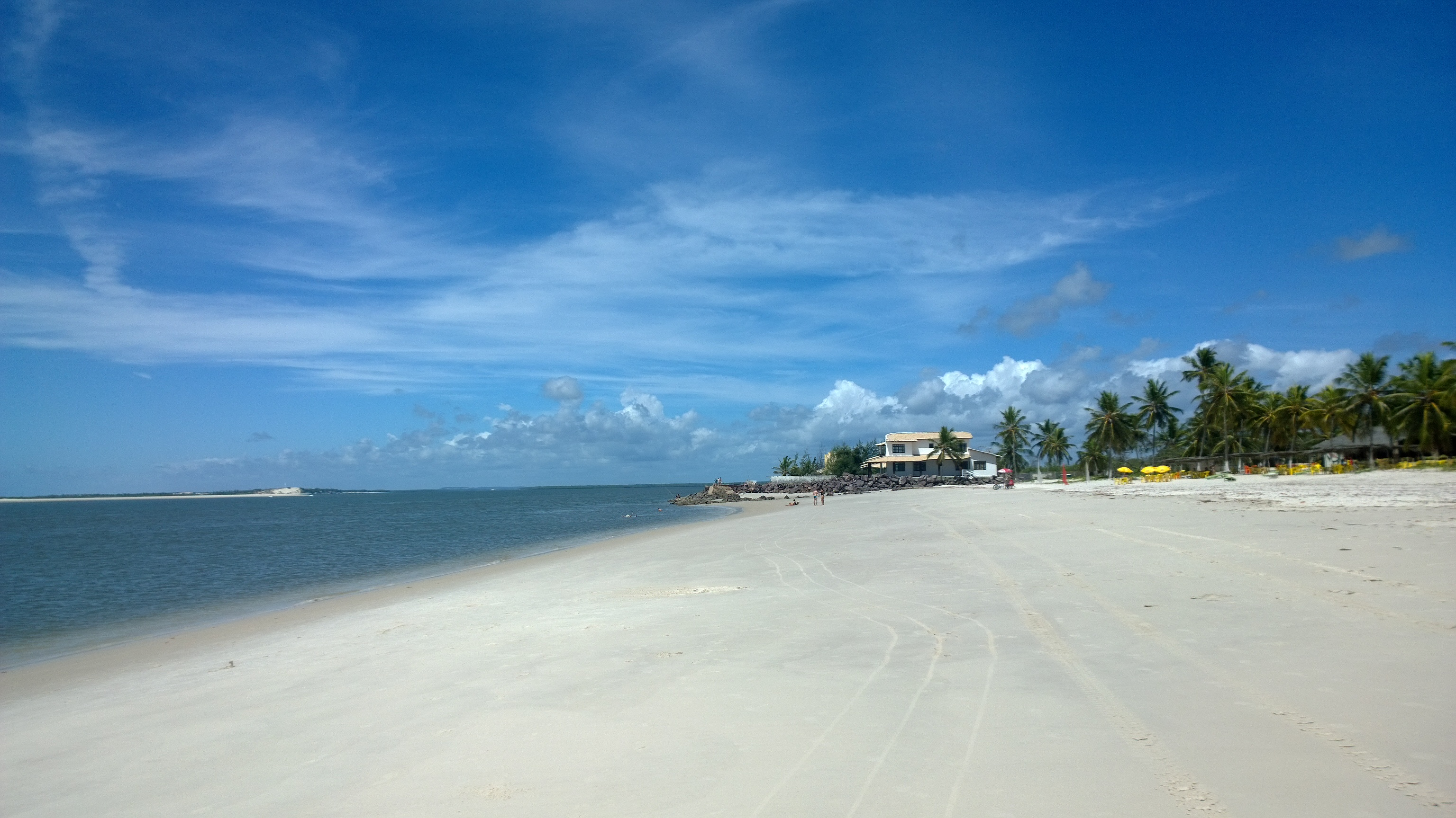 Praia do Saco - Divisa entre SE e Mangue Seco-BA